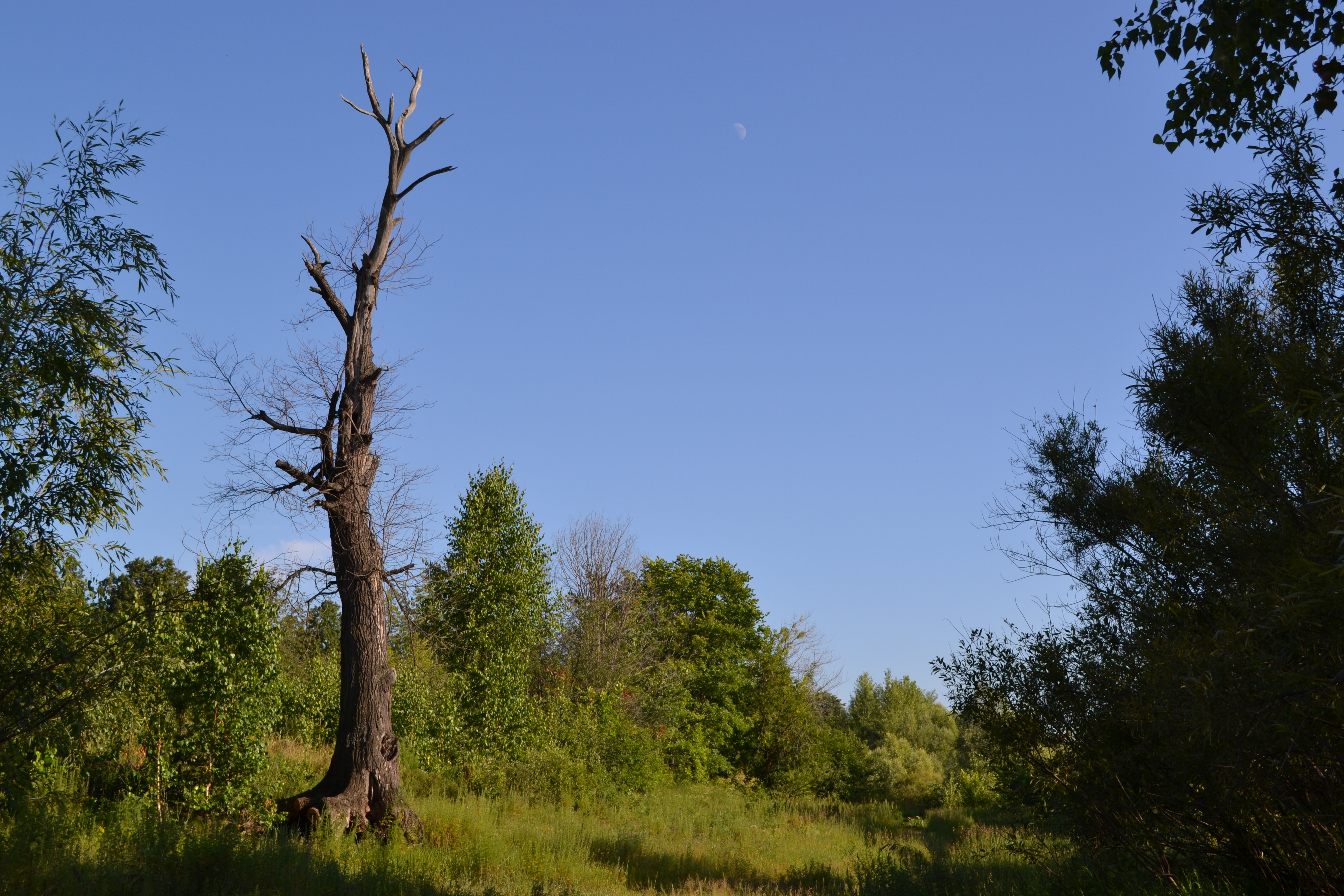 Красная поляна, Вятскополянский район